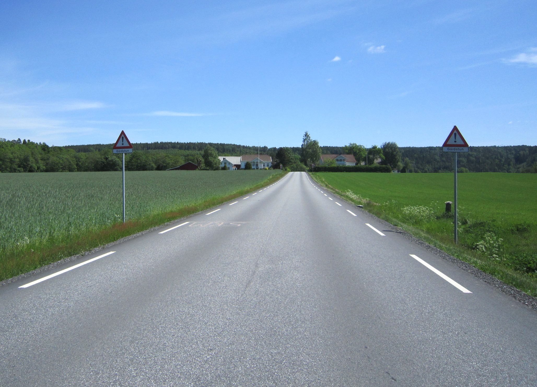 Bøklevene (FV884) ikke langt fra Idd kirke